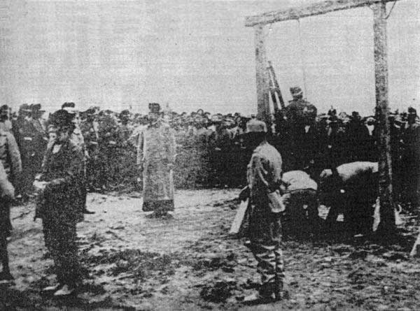 Талергоф в 1917 г. Место, где проводились лагерные экзекуции.